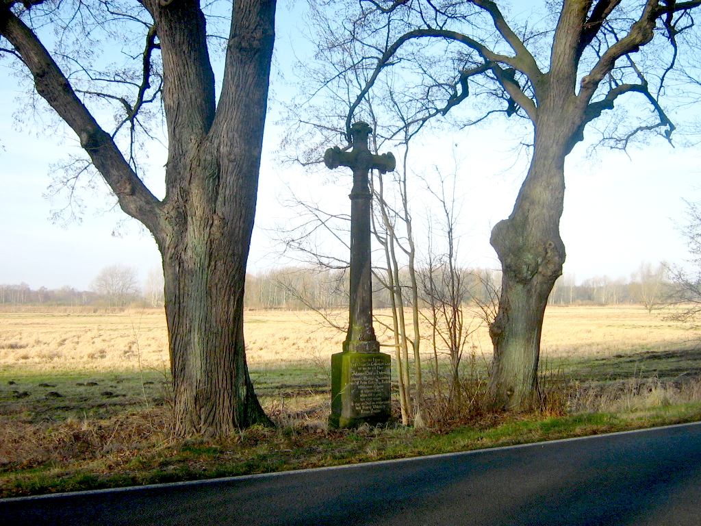 Steinkreuz am Kremmer Damm